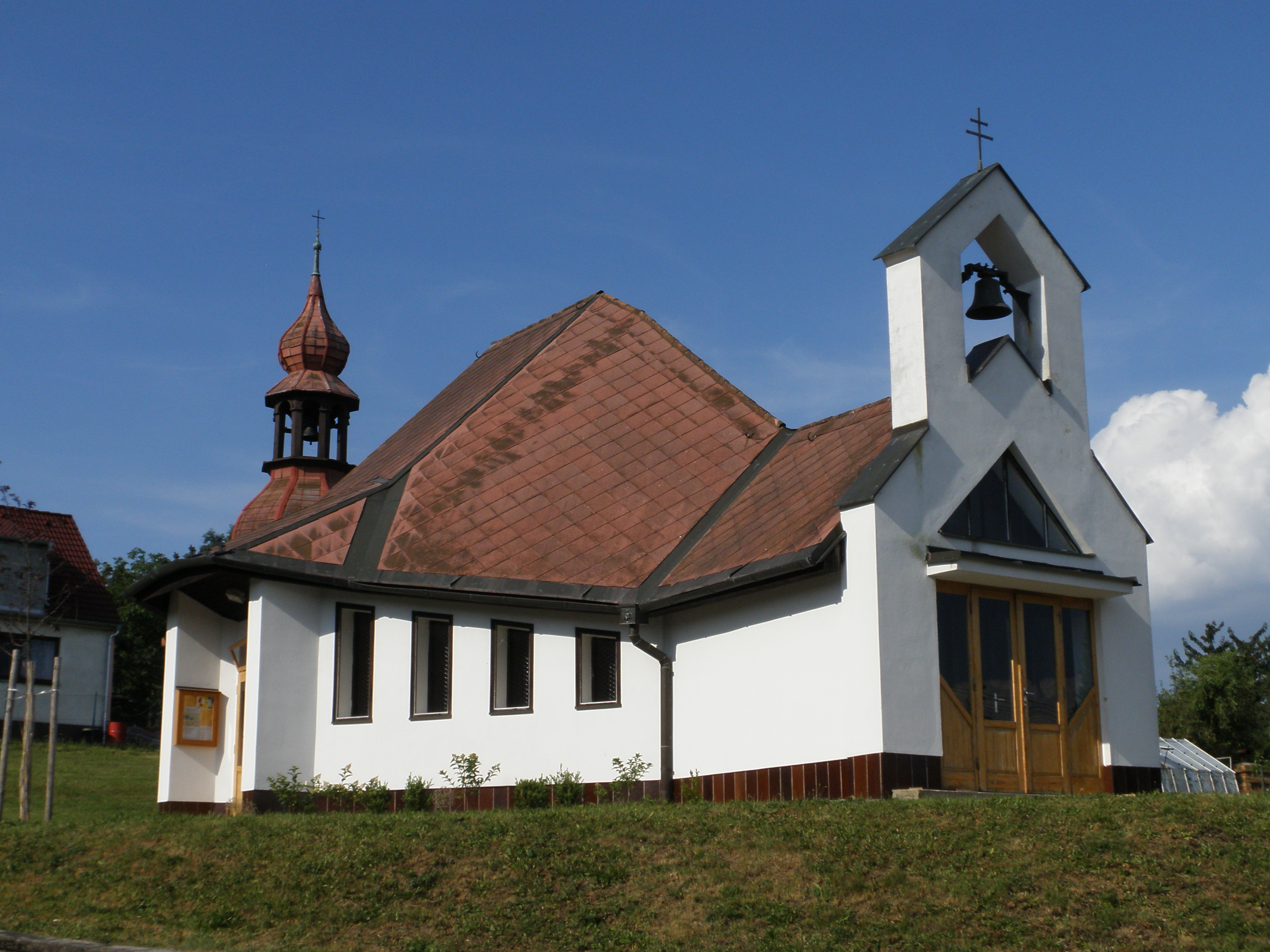 Kaple svatého Antonína Paduánského v Rozseči nad Kunštátem